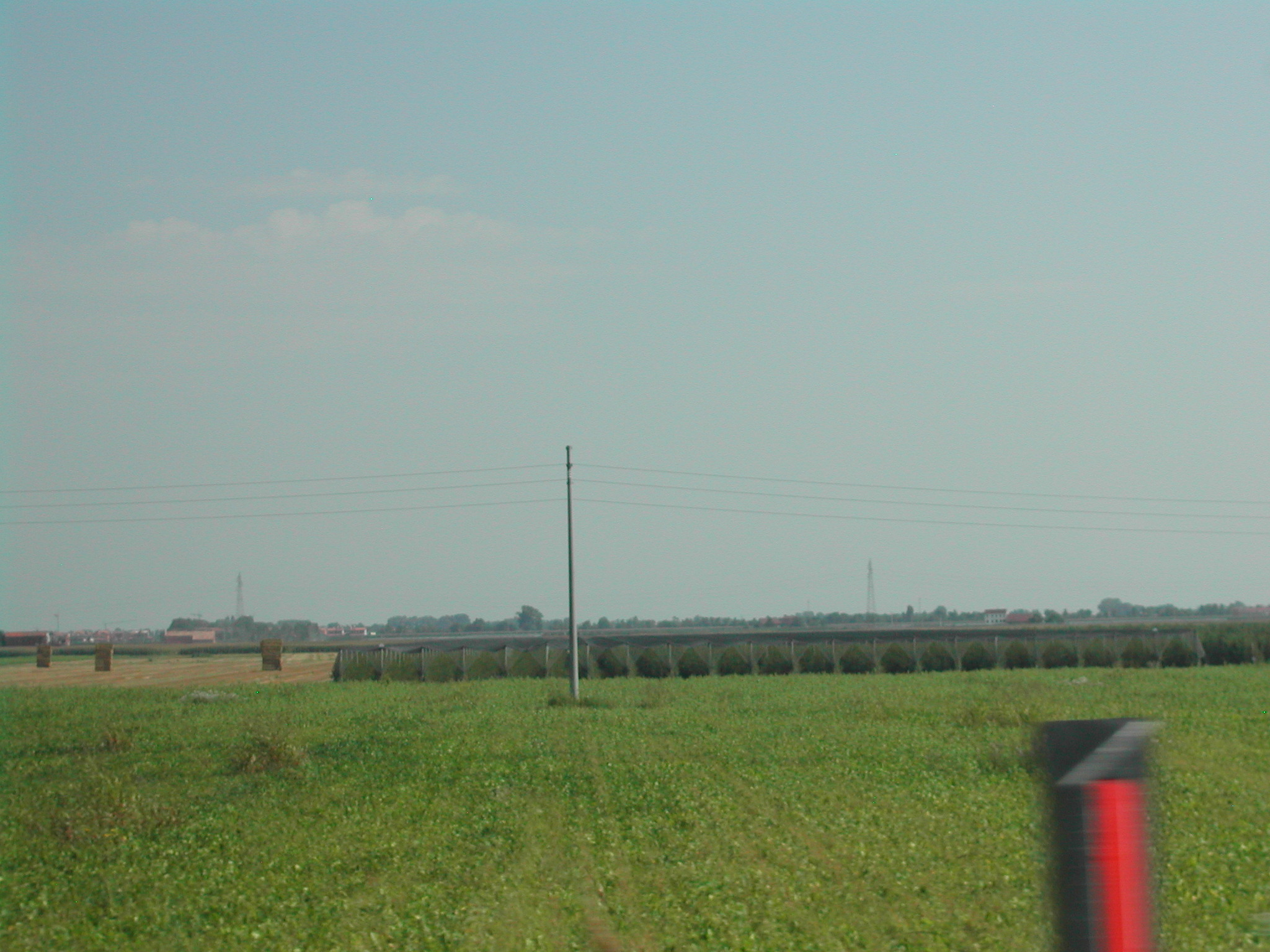 Venezianische Tiefebene hinter Jesolo